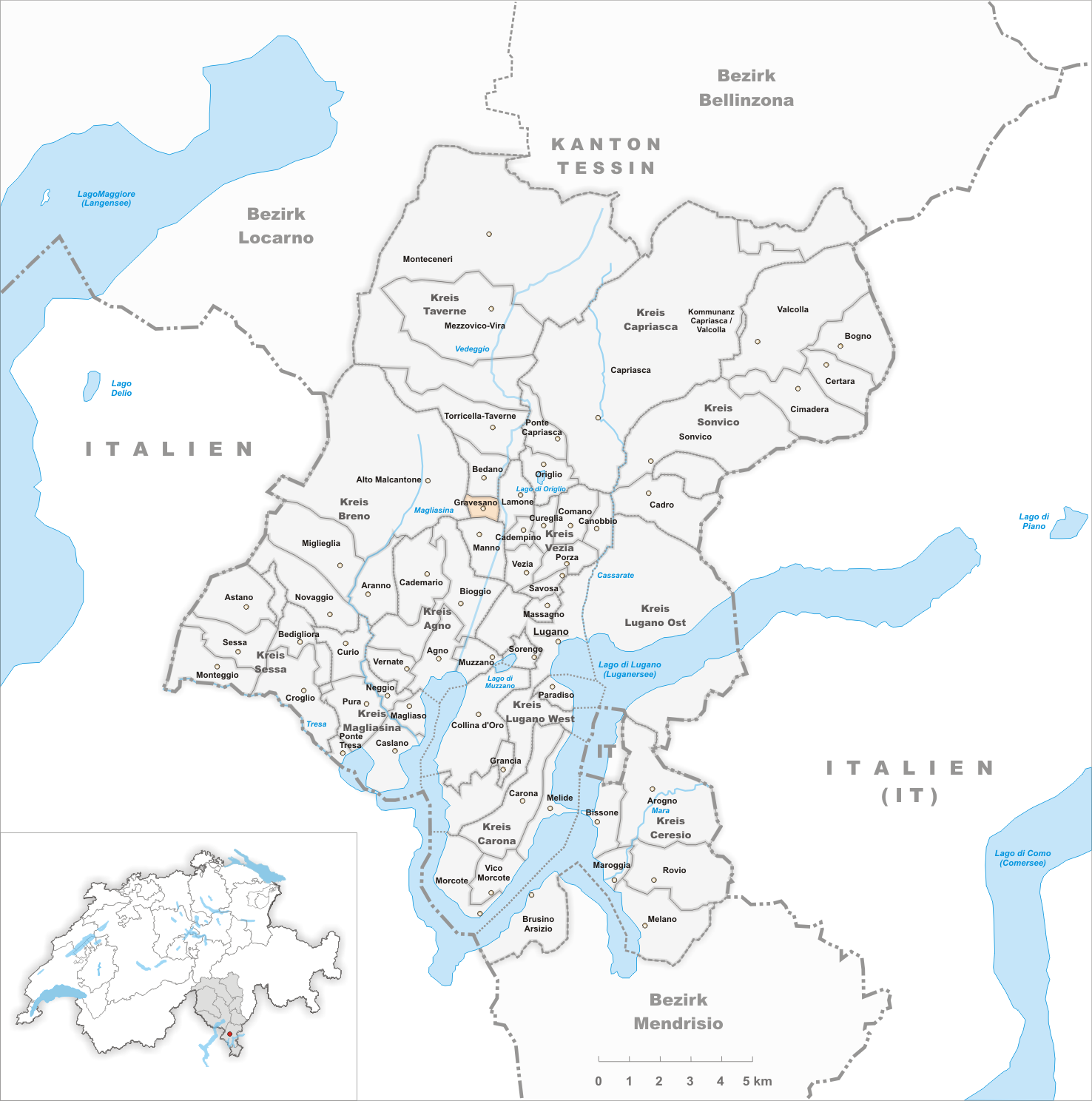 Municipality Gravesano